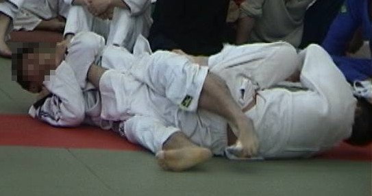 膝十字固め